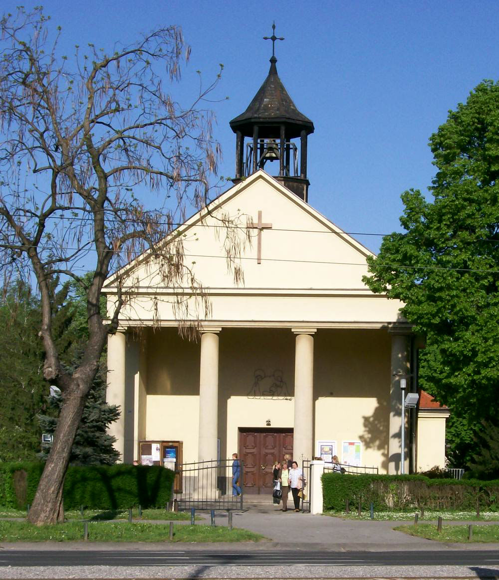 Crkva Sv. Obitelji, Zagreb, Držićeva